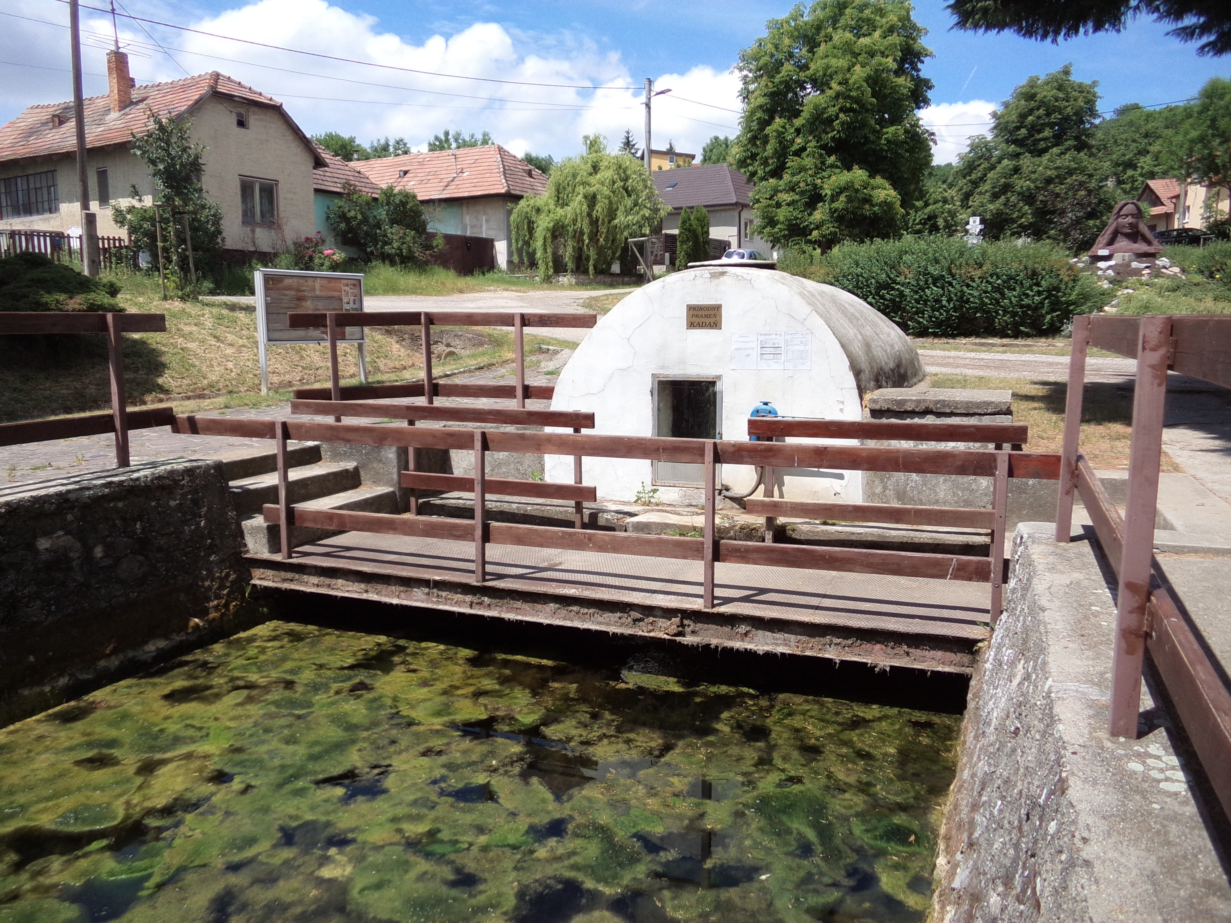 Alsócsitár